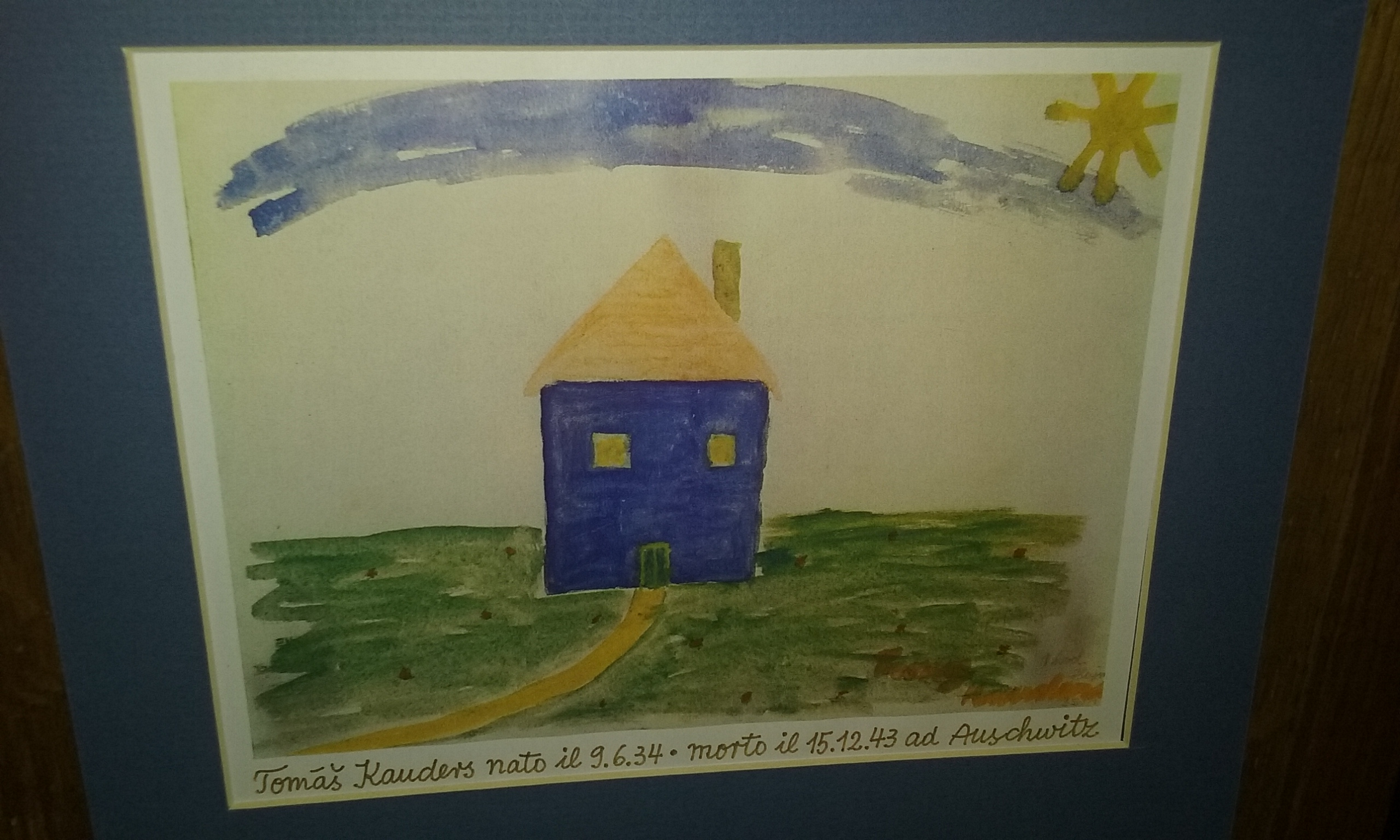 Dipinto realizzato da un alunno di Friedl nato il 9/06/1934 e morto ad Auschwitz il 15/12/1943. La foto è stata scattata a Pisa nel gennaio del 2016 durante una mostra organizzata in onore di Friedl.